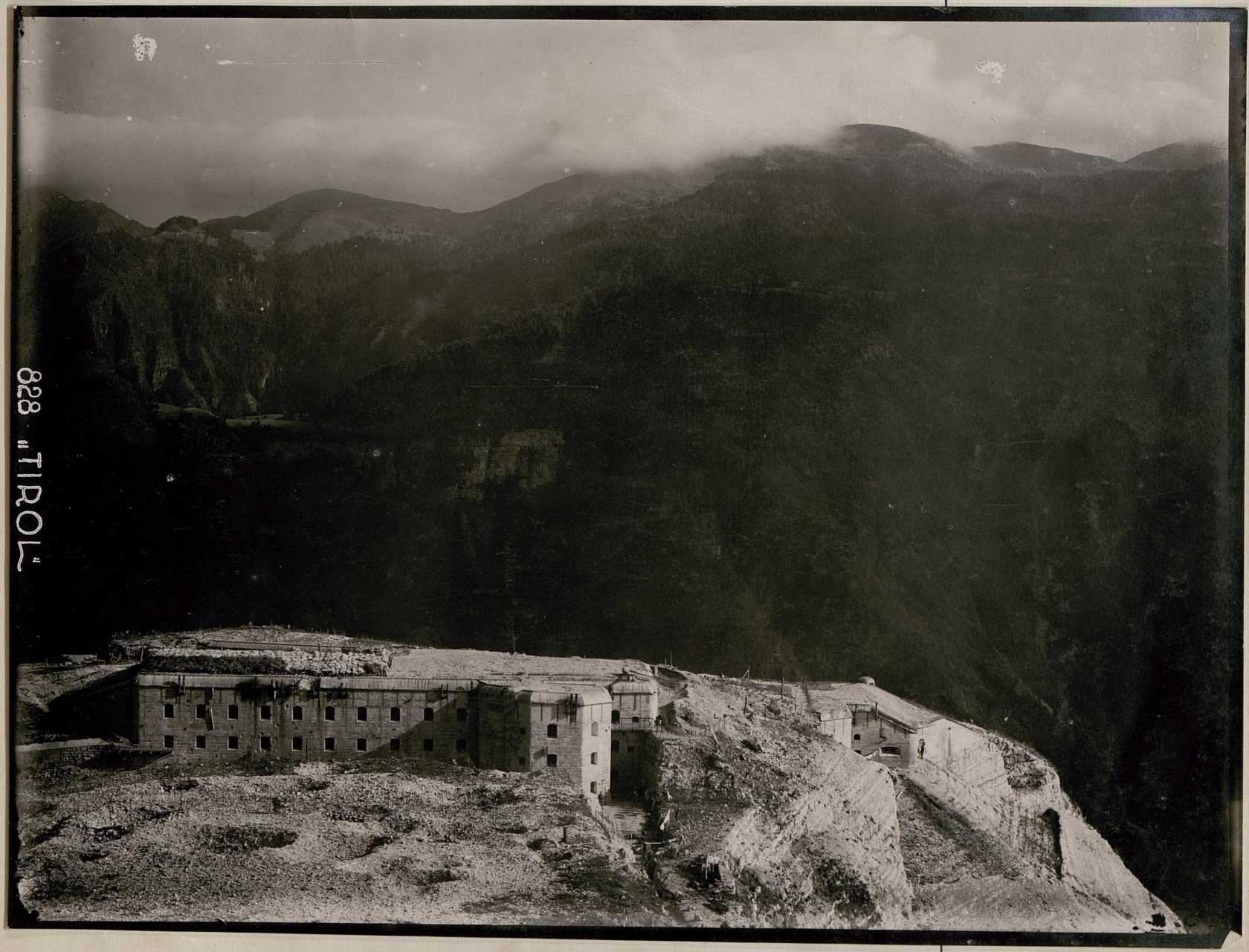 Werk Gschwend